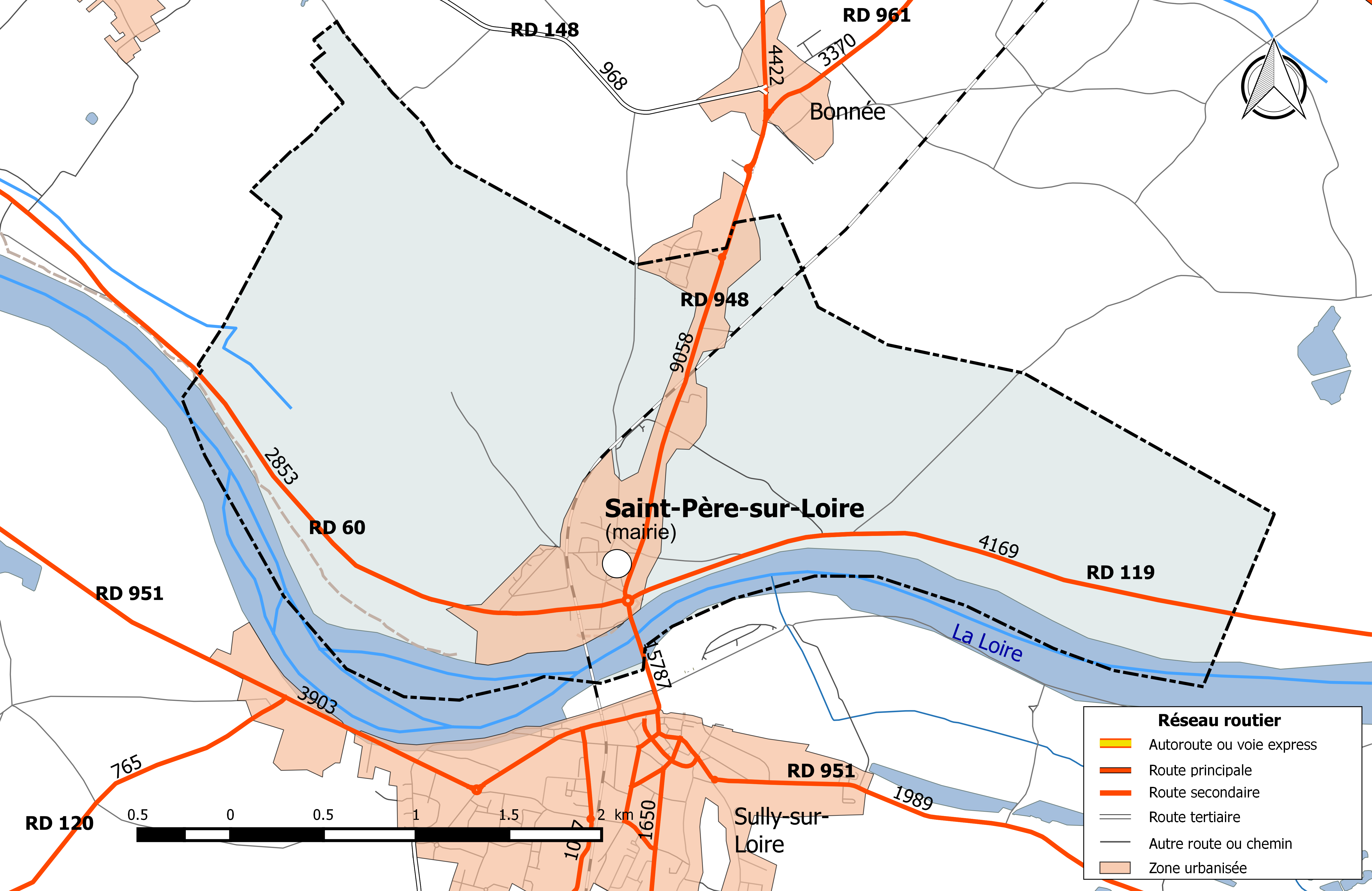 Carte du réseau routier de la commune de Saint-Père-sur-Loire.